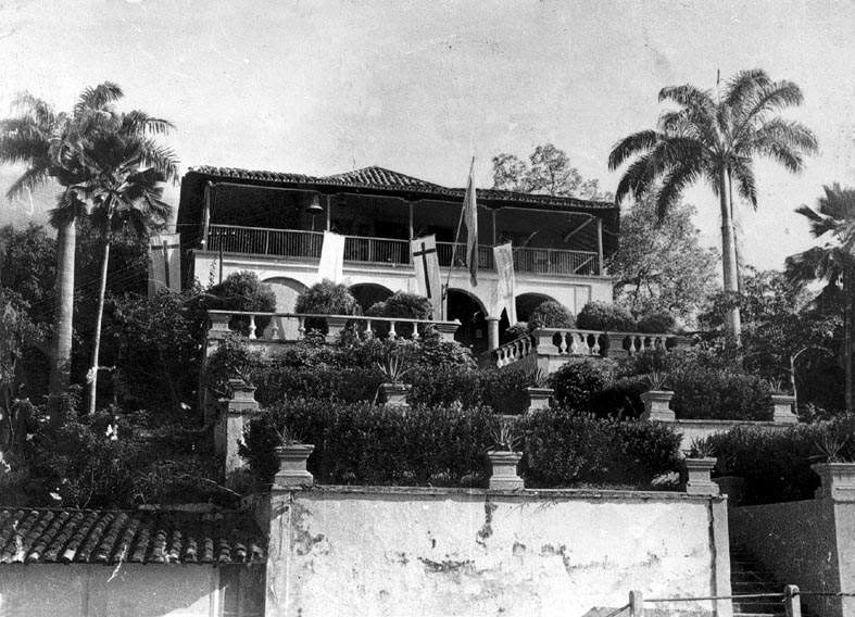 Casa del Marques de Casa León en las adyacencias de El Limón, en el Estado Aragua.